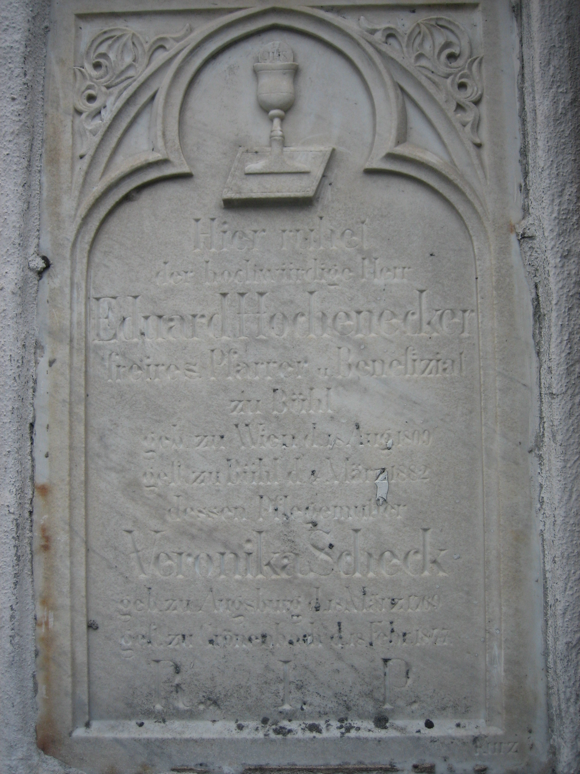 Grabtafel an der Stiftskirche Bad Grönenbach von Pfarrer Eduard Hochenecker